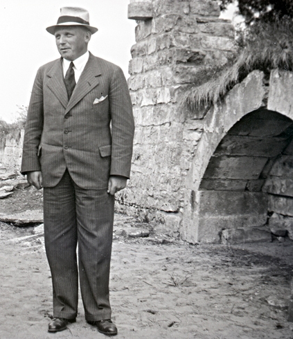 Gunnar Ullenius (1901-1979) vid Gudhems klosterruin